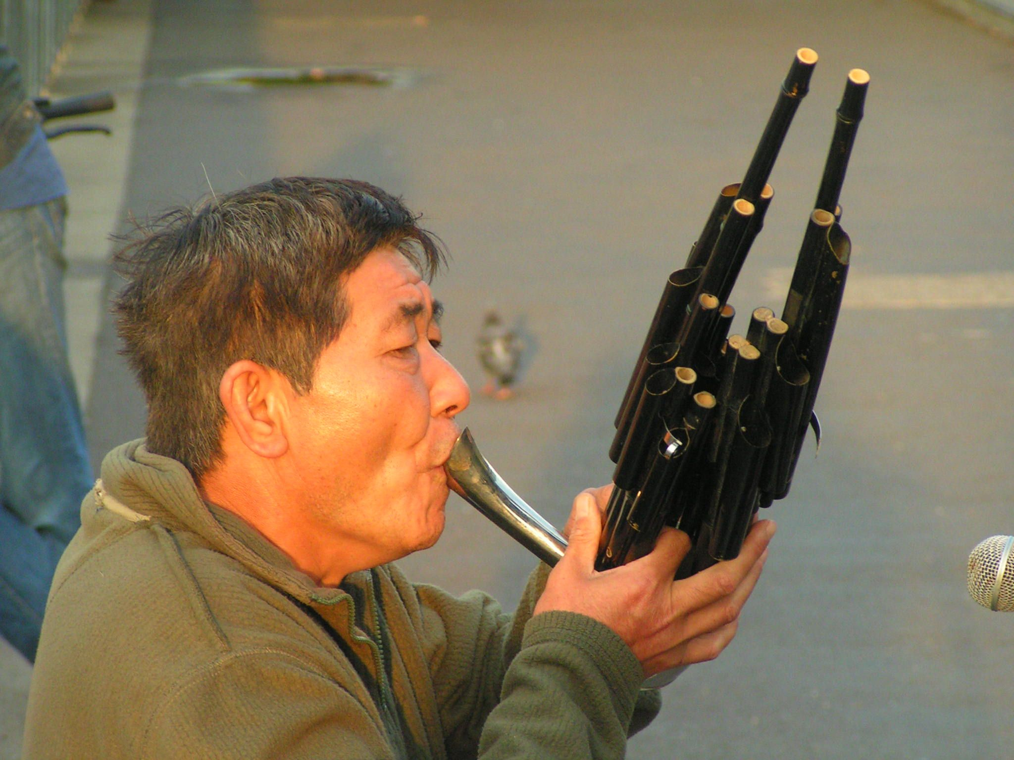 Londoner Straßenmusikant mit Mundorgel